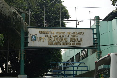 Gelanggang Remajar